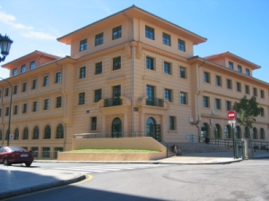 Vista general del Edificio Valdés Salas (Oviedo)